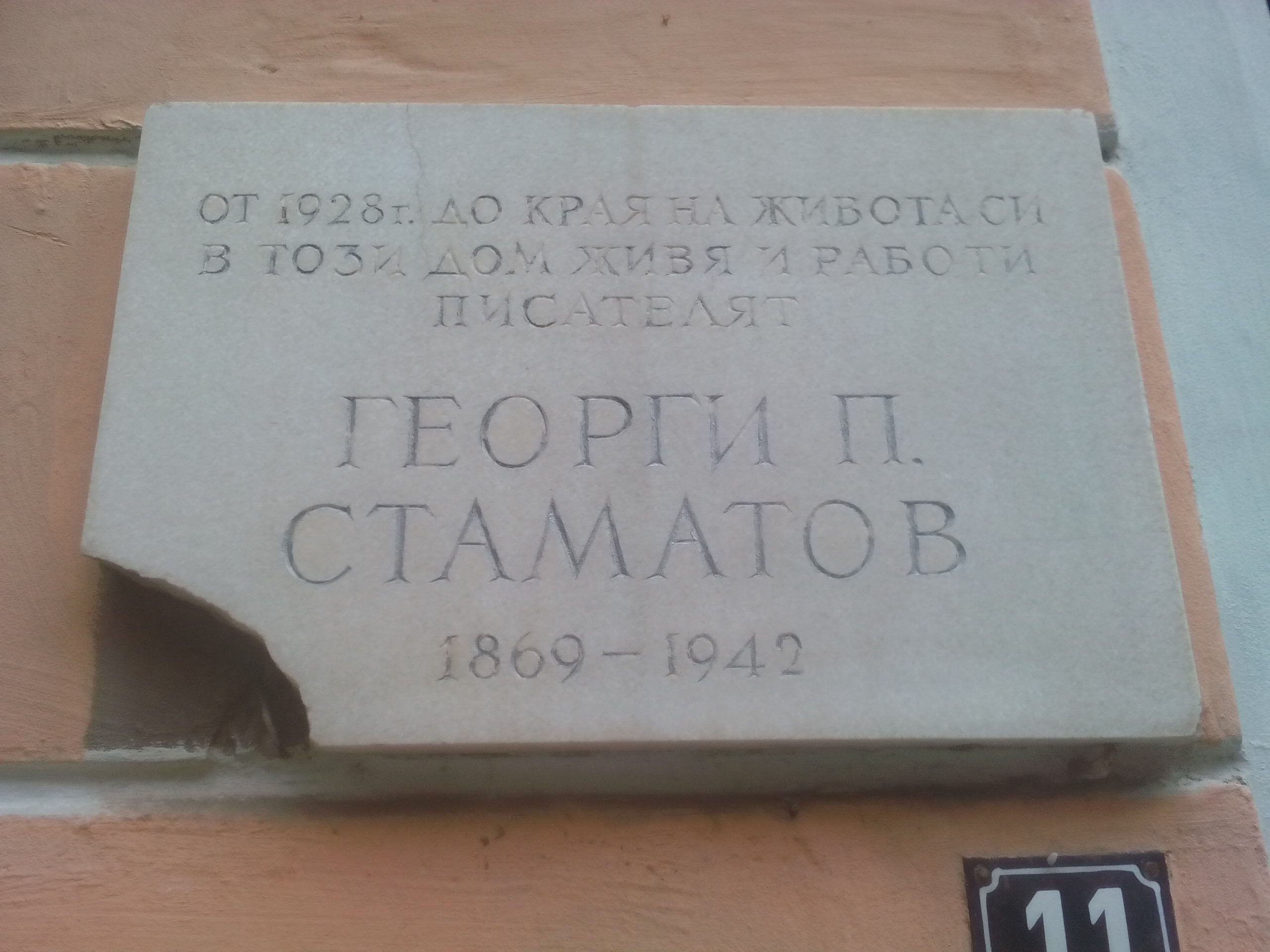 Паметната плоча на къщата, в която Г.П.Стаматов живее през последните години от живота си. София, ул. "Юрий Венелин" №11